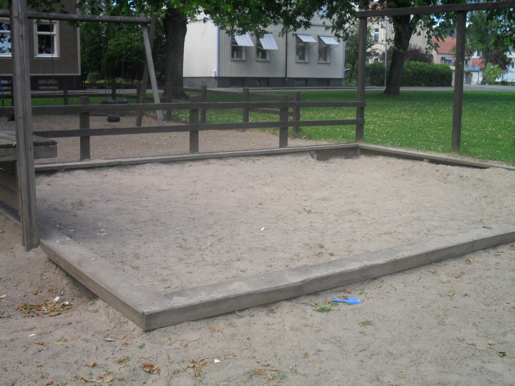 En sandlåda